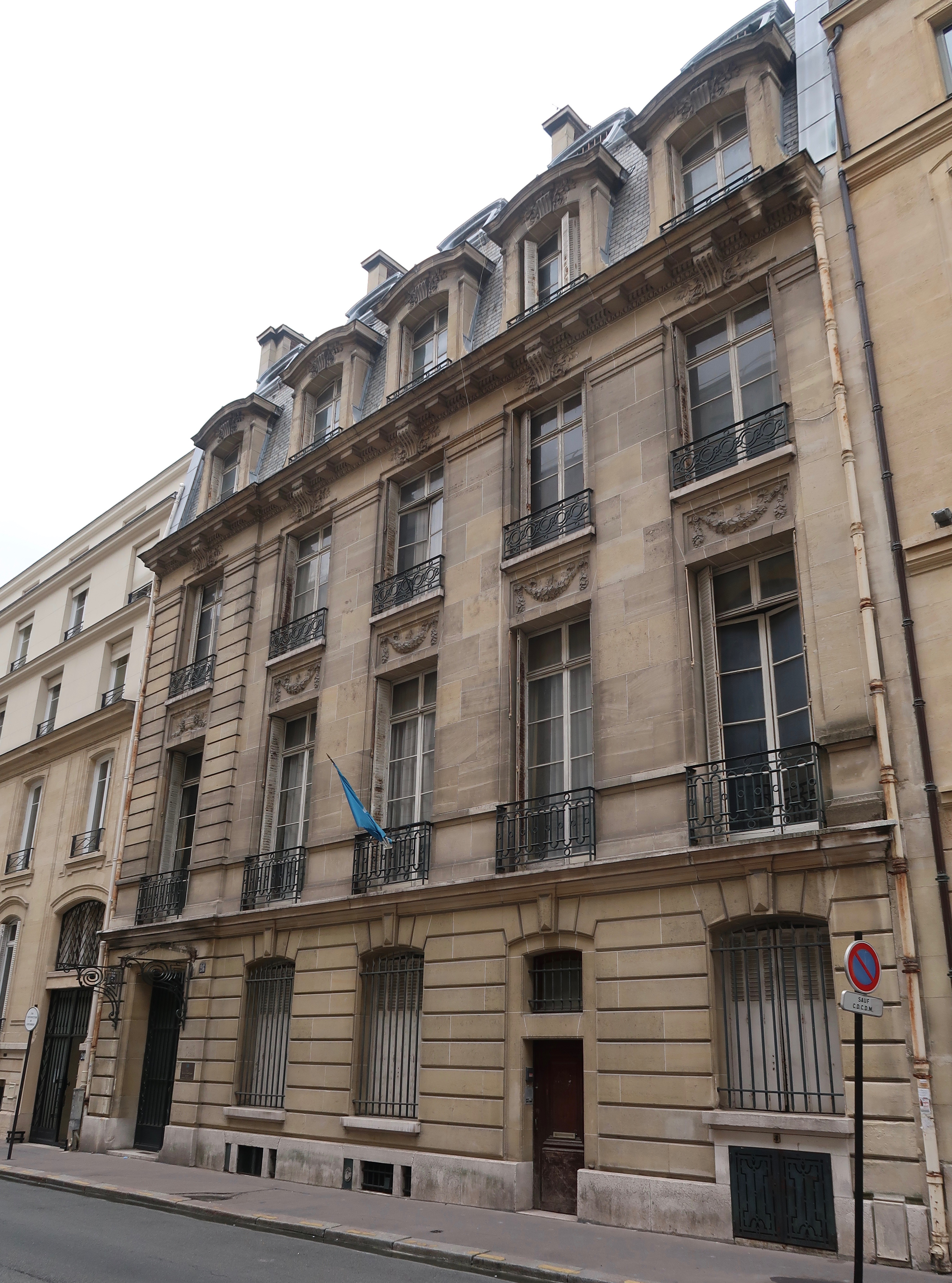 Ambassade de Somalie en France, 26 rue Dumont-d'Urville (Paris 16e).